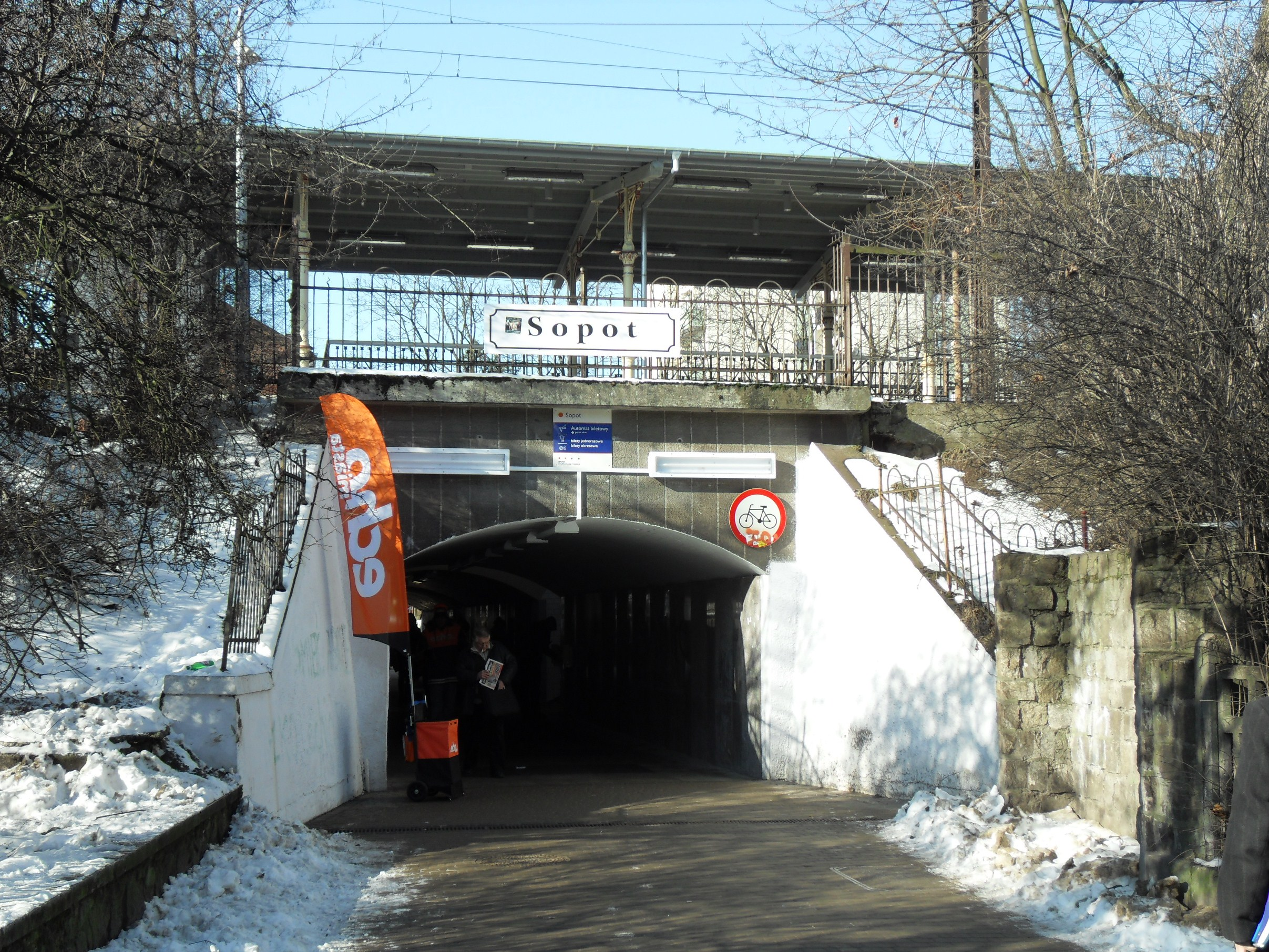 Sopot - tunel pod torami kolejowymi, od strony Dolnego Sopotu.